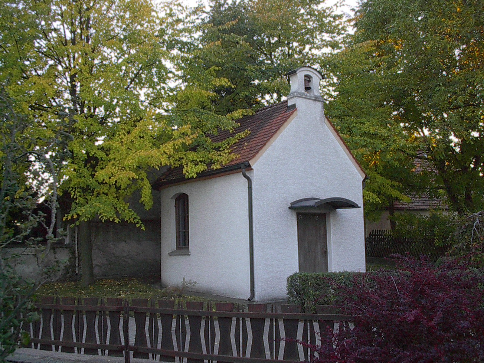 DieSt. Wendelinskapelle in Feldkirchen (Neuburg-Donau)